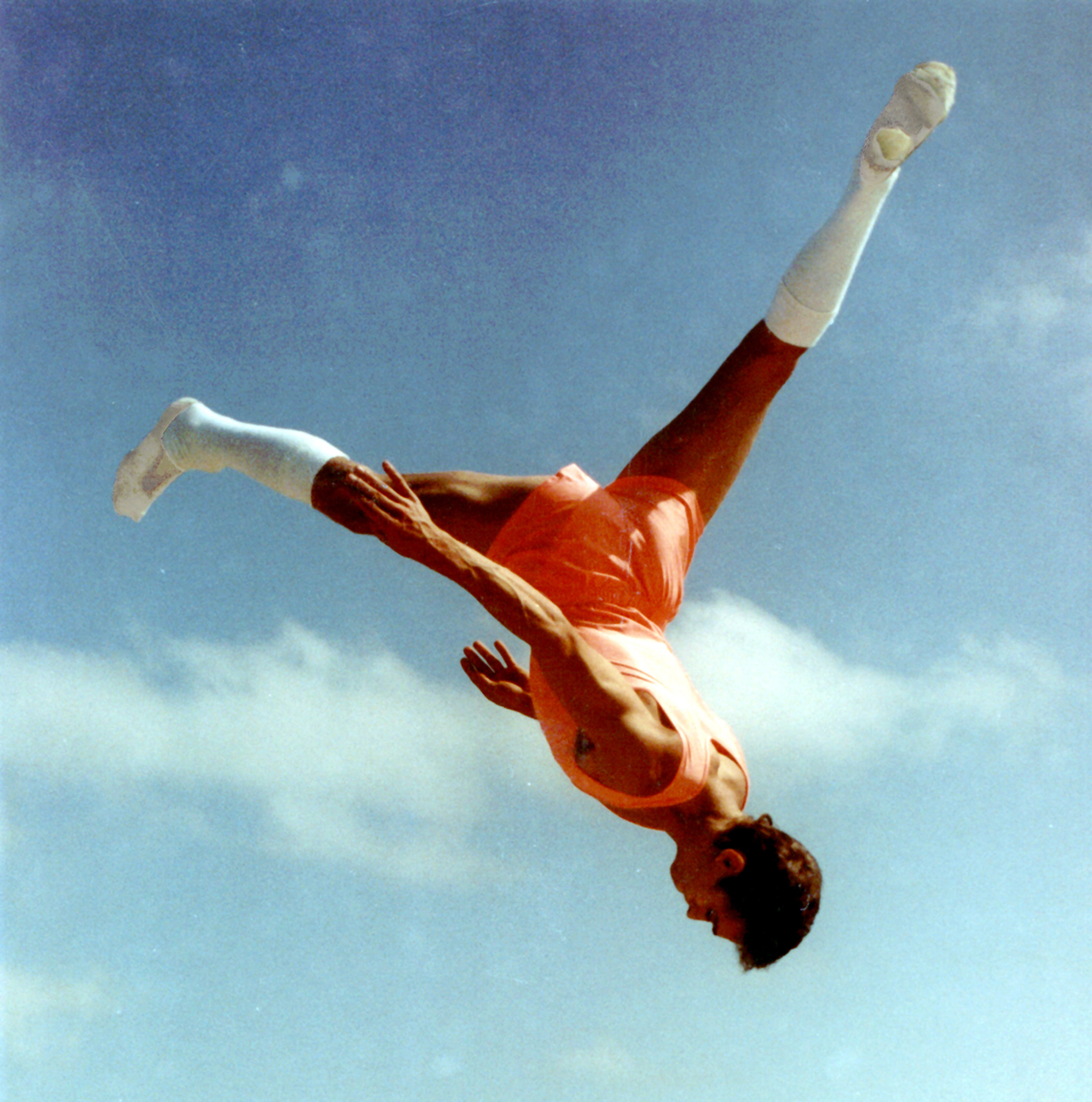 Figure acrobatique le "EOUZAN" créée par Pascal EOUZAN